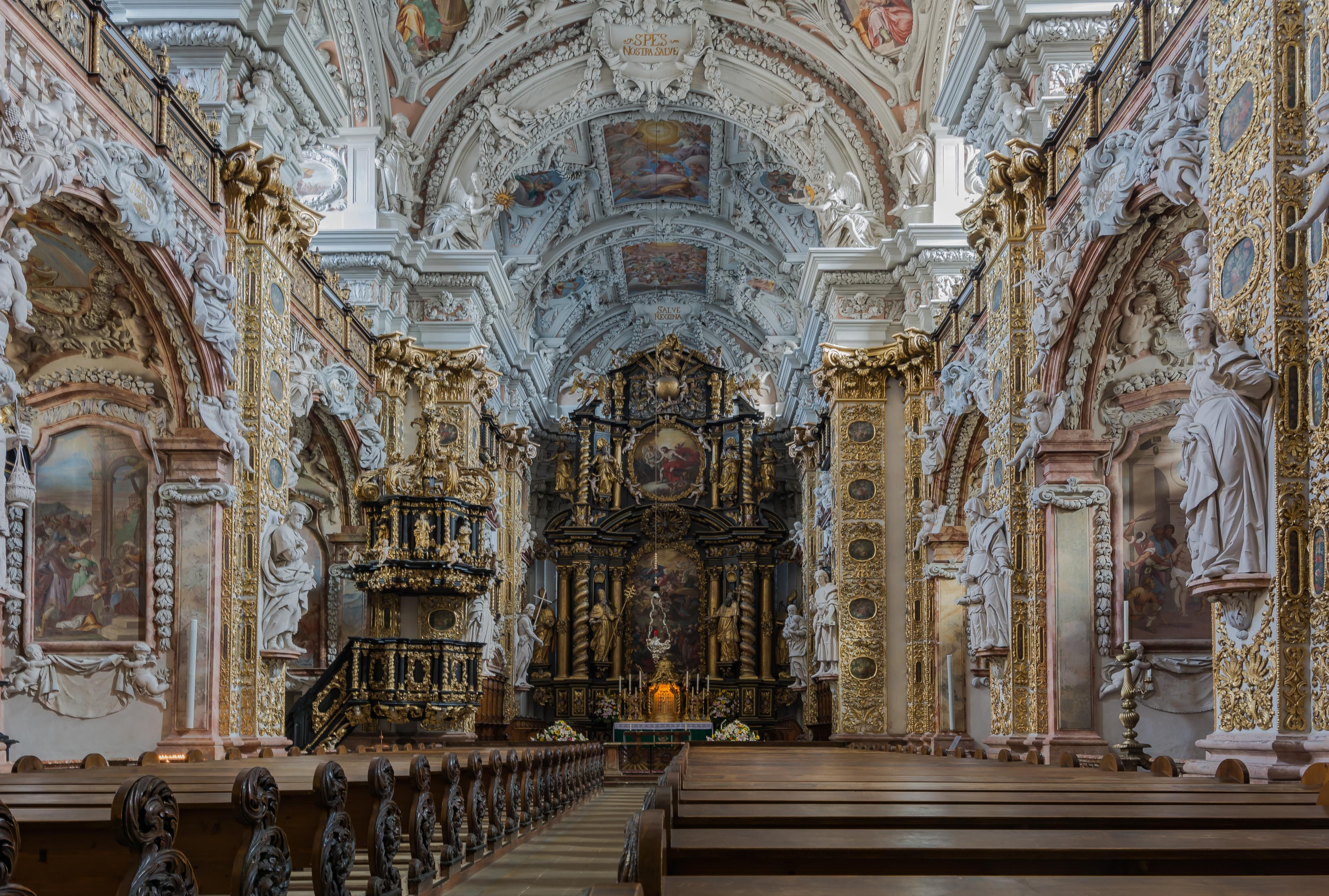 Gesamtanlage Zisterzienserstift Schlierbach